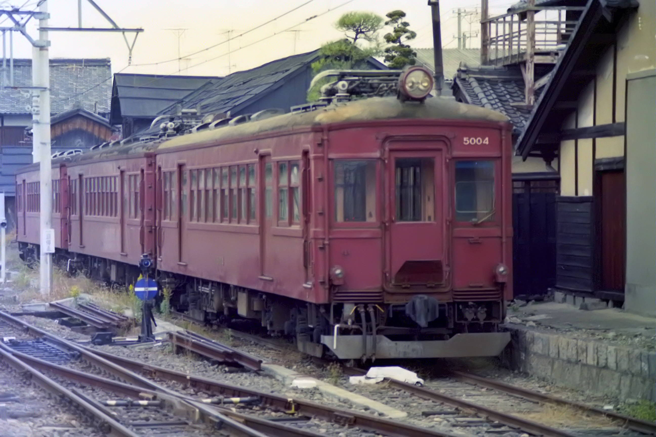 近鉄伊賀線5000系電車 1985年